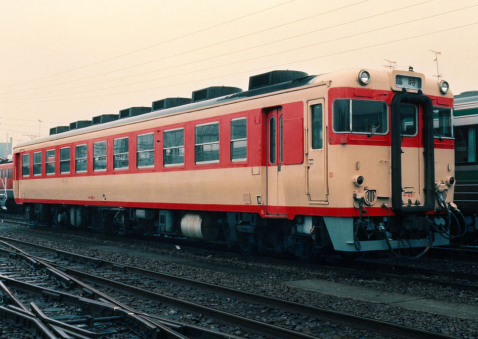 国鉄キハ65 1